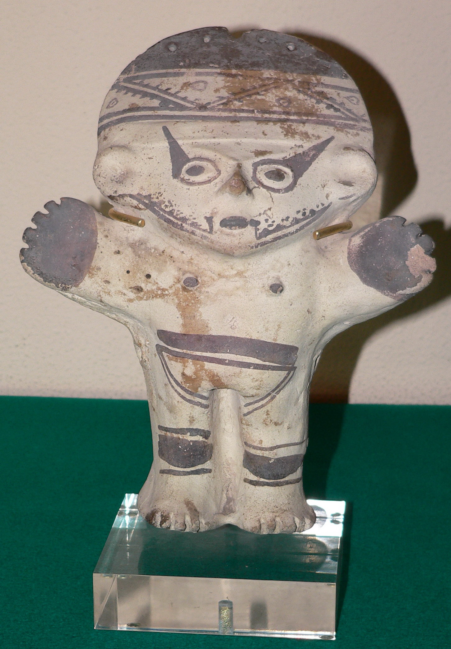 Descripción: Idolo de barro macizo Antigüedad: Entre 1.200 y 1.470 d.C Cultura: Cultura Chancay País : Perú Fotógrafo: © Manuel González Olaechea y Franco Fecha de la foto : 25 de abril de 2008